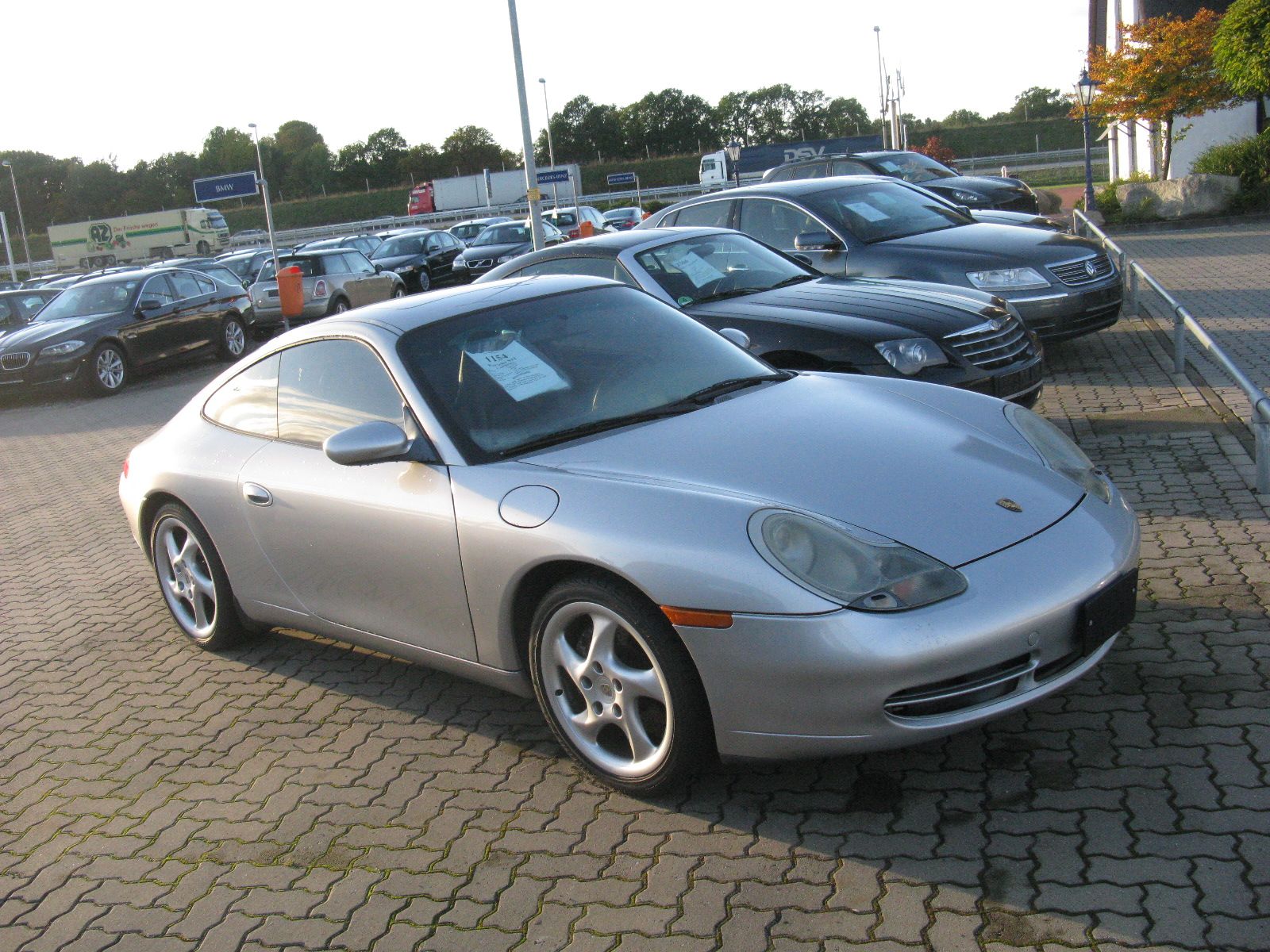 DAT Autohus, Böckel